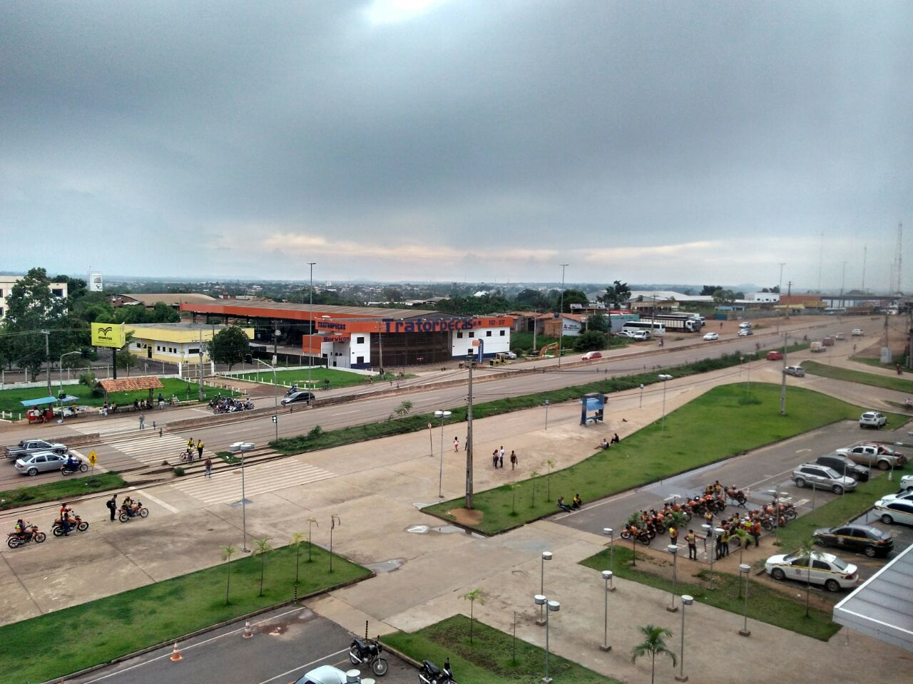 Vista da BR-230, a partir do shopping Pátio Marabá, no bairro Folha 34, distrito de Nova Marabá, em Marabá.